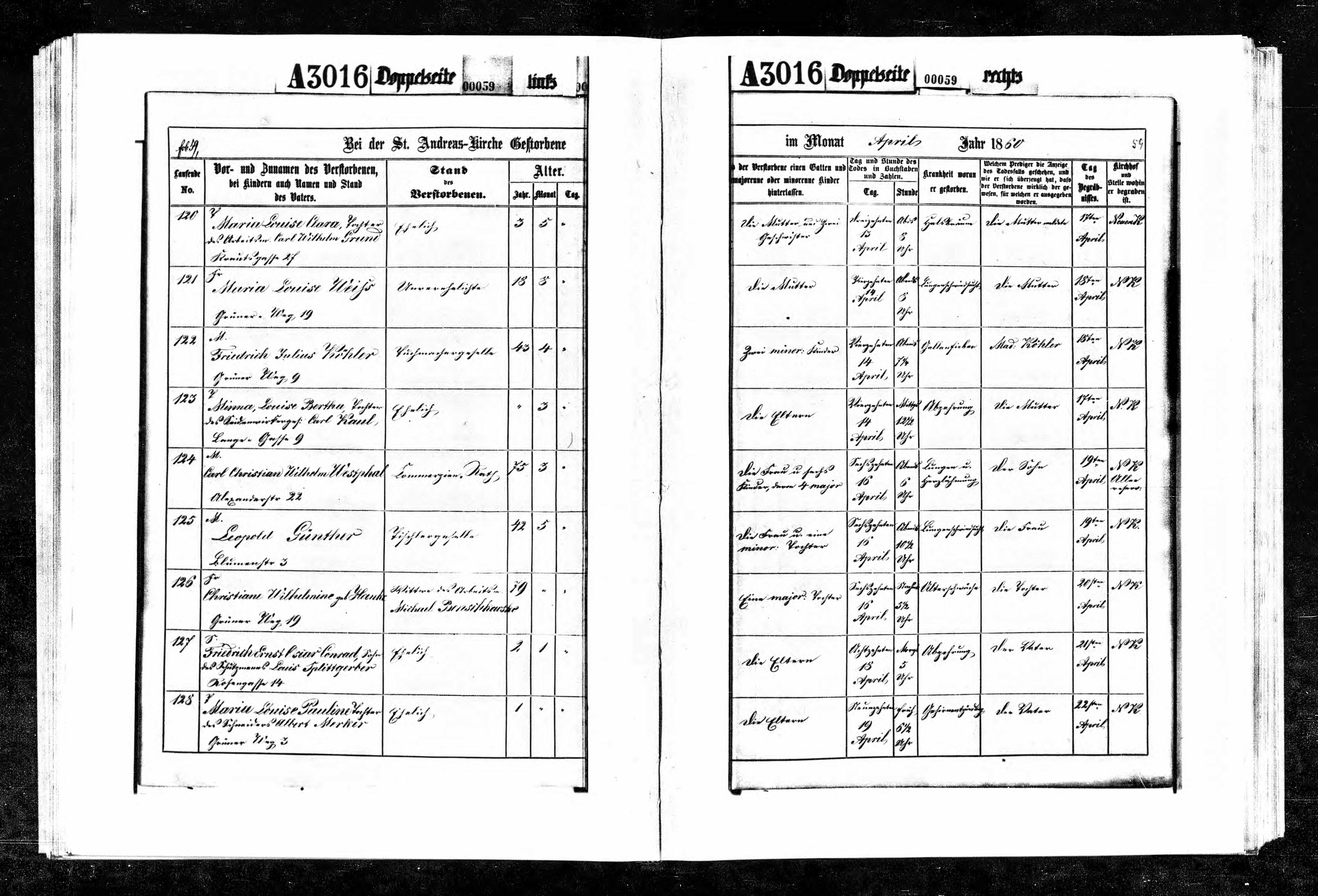 Sterbeurkunde Christian Carl Westphal (* 23. Dezember 1783 in Elsdorf bei Köthen; † 16. April 1860 in Berlin)